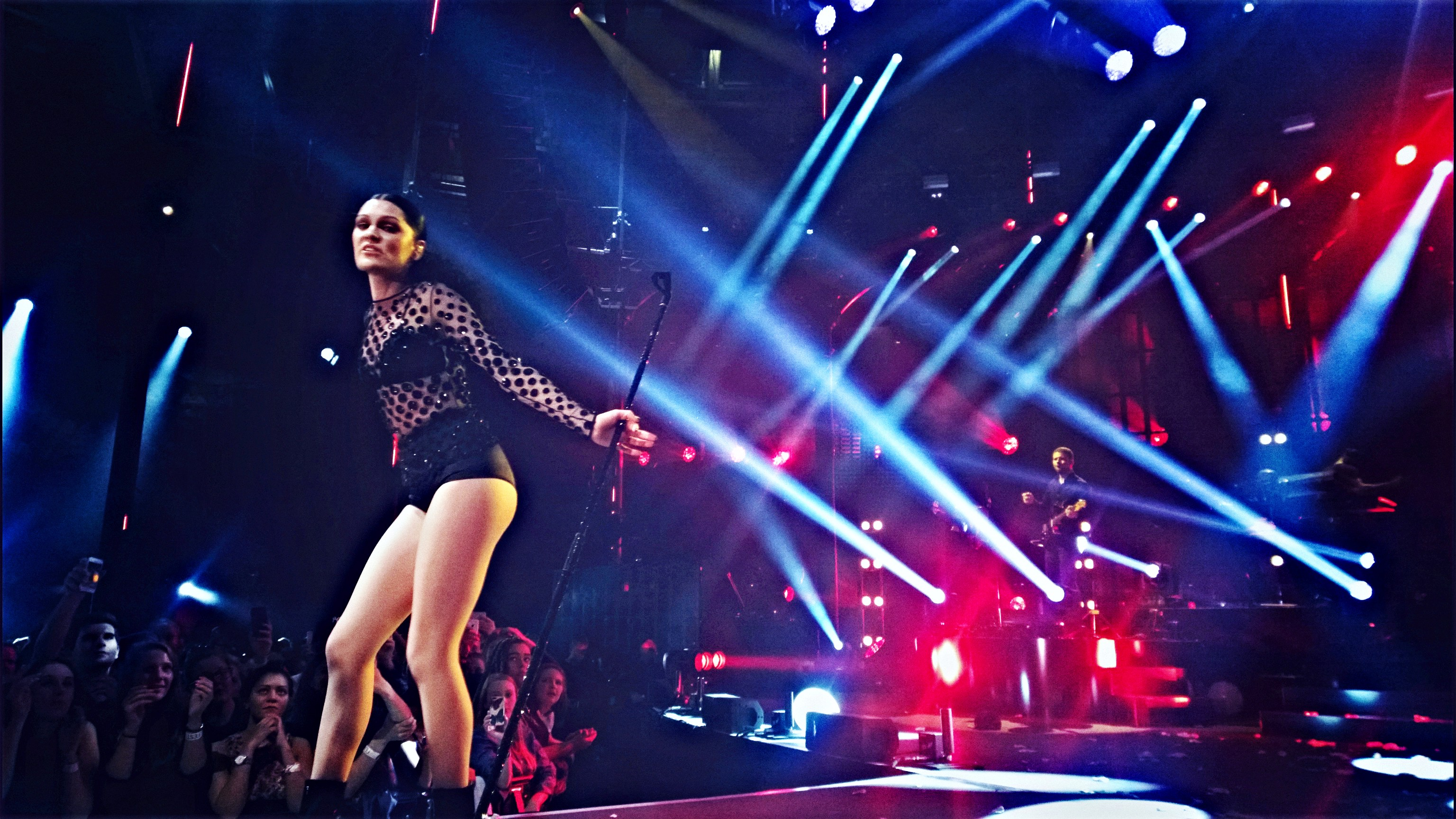 Jessie J, Roundhouse, London, iTunes Festival